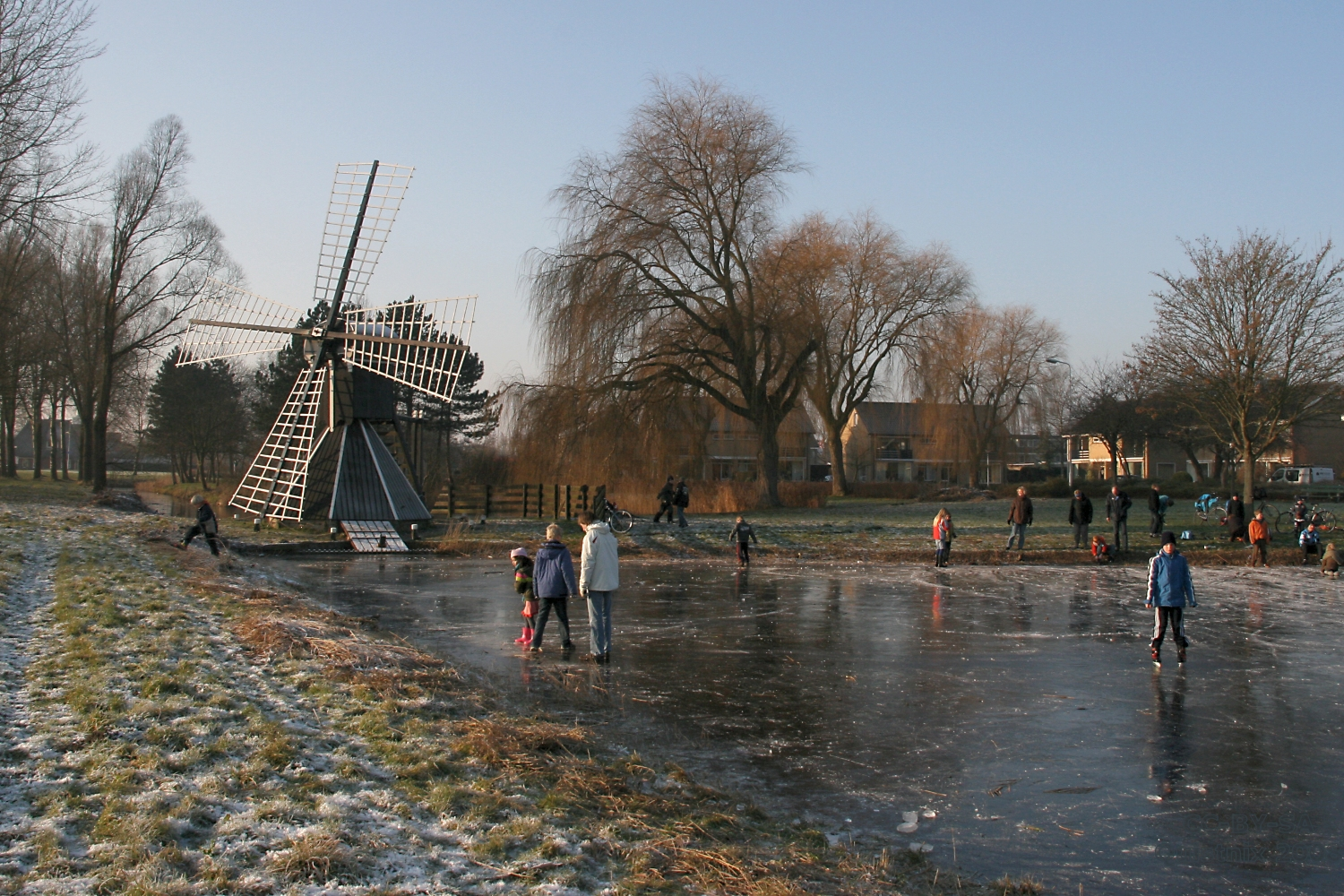 Franeker: ijspret rond molen Arkens